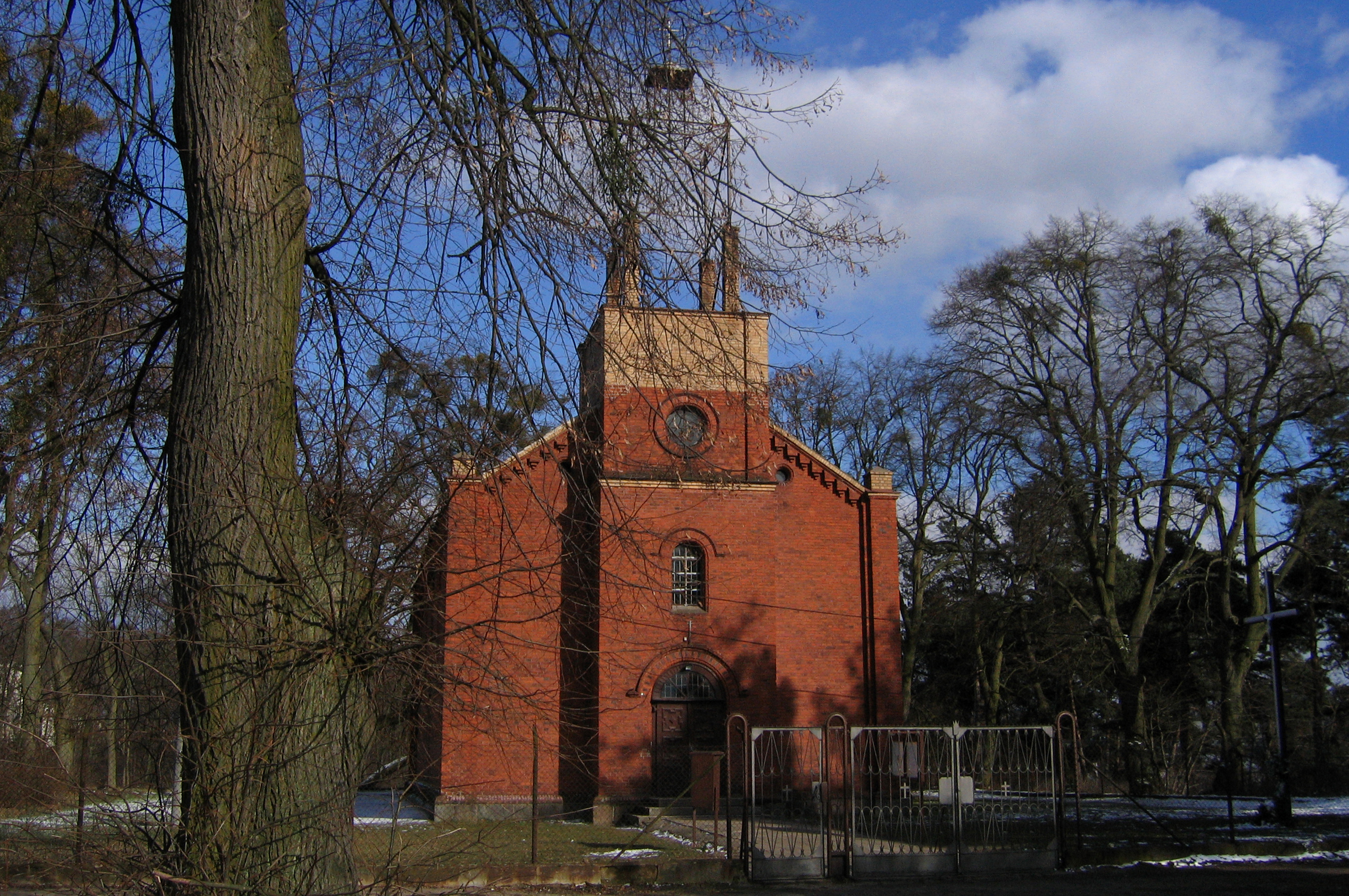 Kościół p.w. św. Apostołów Piotra i Pawła, Skoki, 1855-56 r.